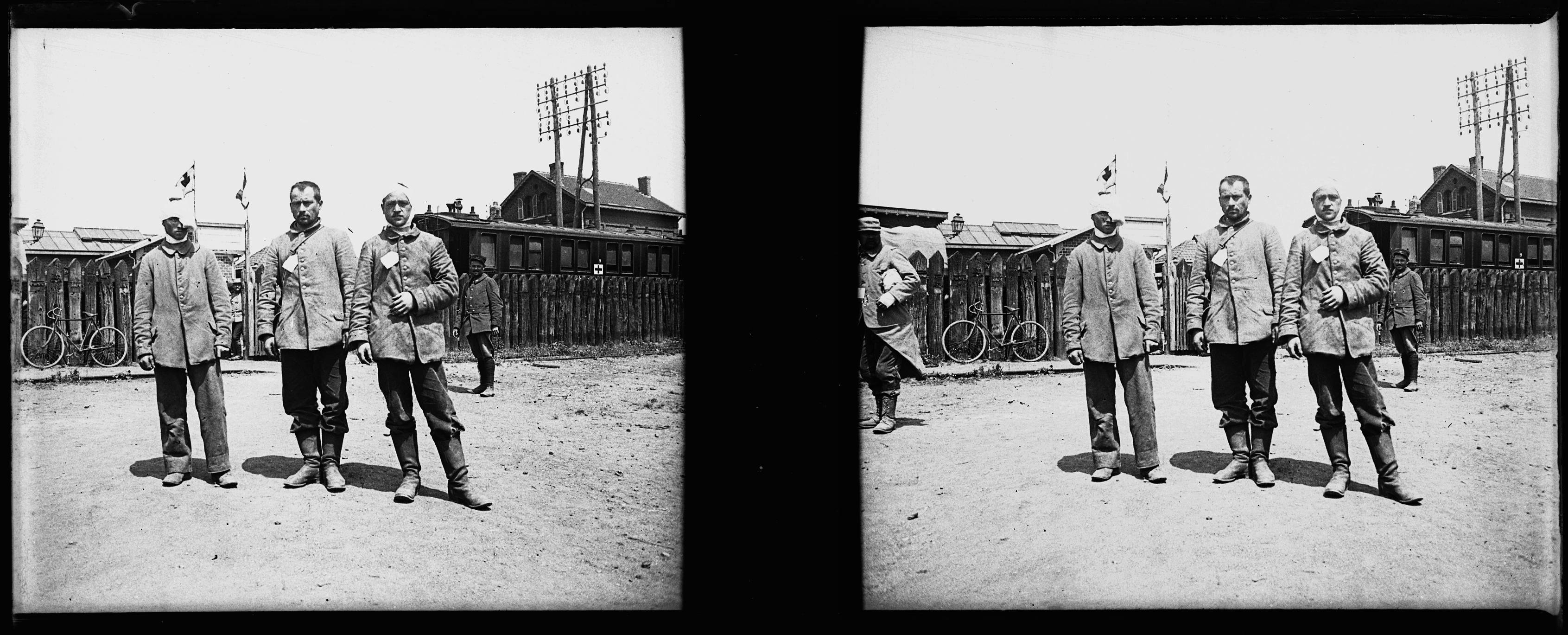 Vue de trois blessés allemands à la gare d'évacuation de Corbie (Somme). 1915. Guerre 1914-1918.